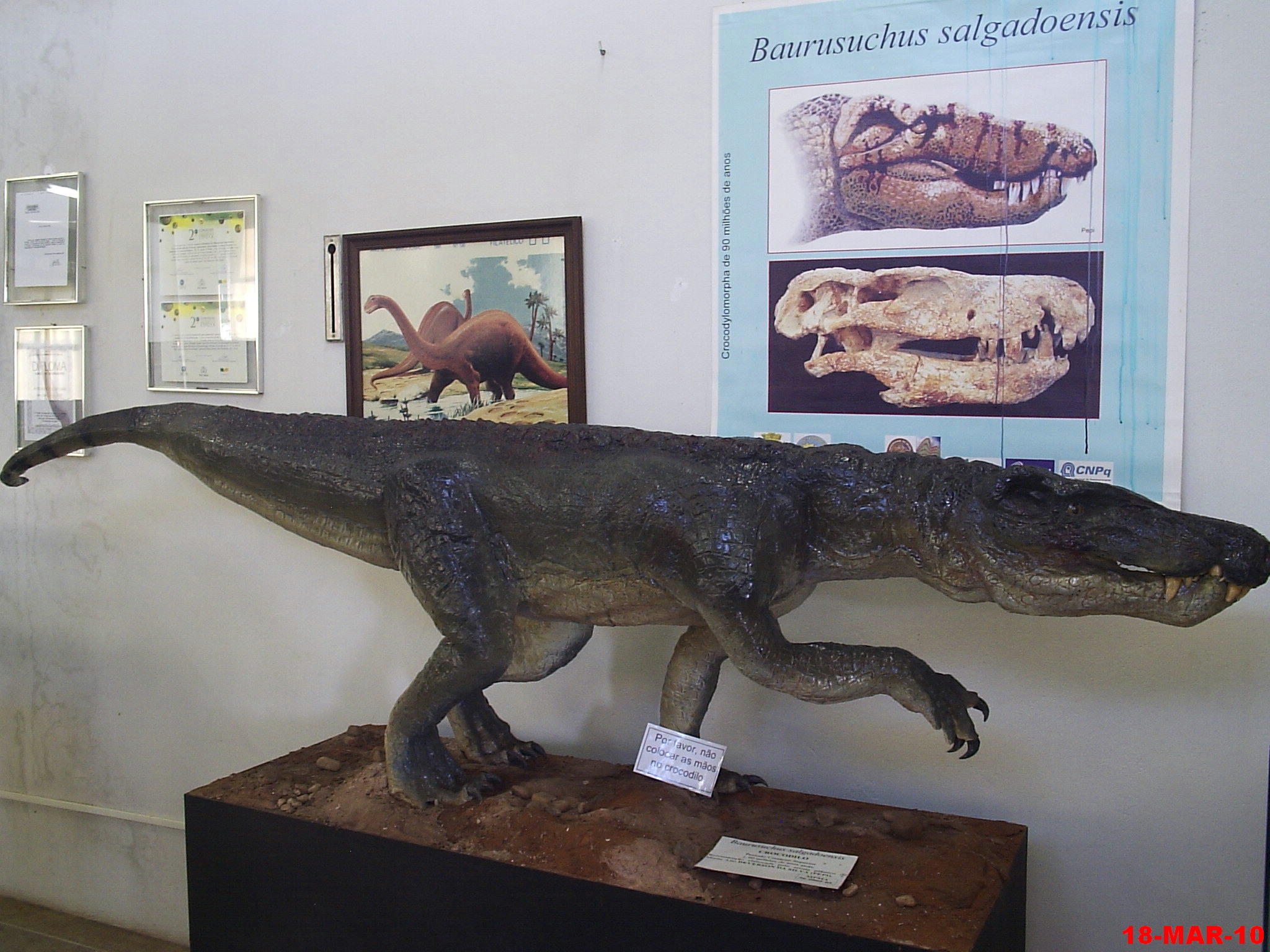 Baurusuchus salgadoensis - Museu Paleontológico de Monte Alto